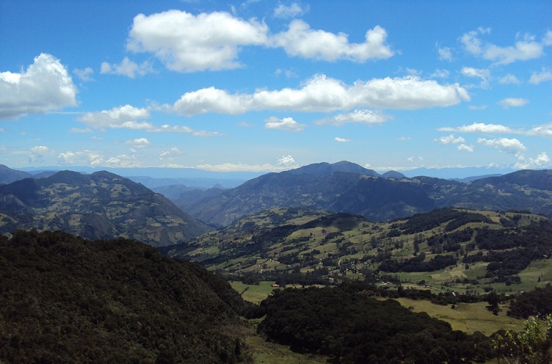 PANORAMICA DE PALERMO